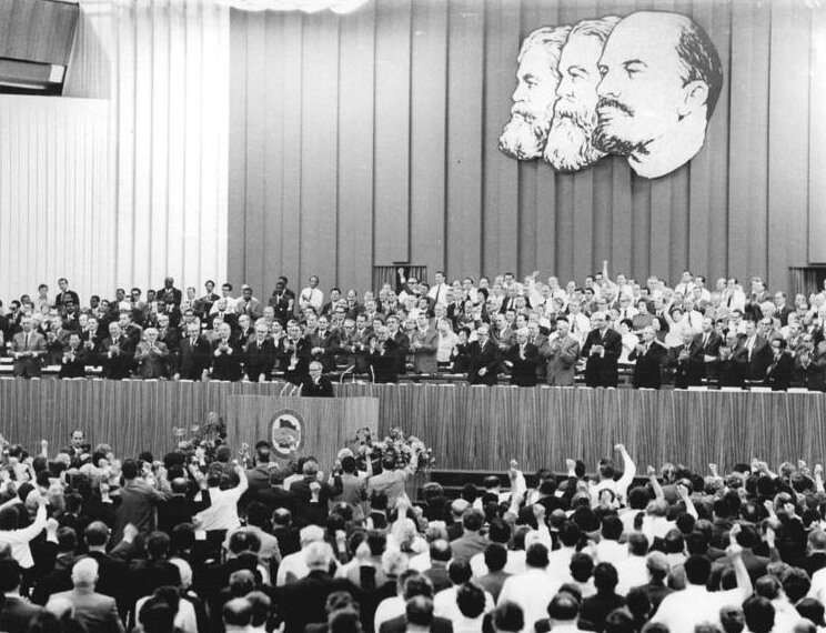 ADN-ZB Kollektiv 15-6-71-ba Berlin: VIII. Parteitag der SED-In der Berliner-Seelenbinder-Halle begann heute (15.6.) der VIII. Parteitag der SED. Zu einem der Höhepunkte am Eröffnungstag gestaltete sich die im Originalton übertragene Grußbotschaft der "Salut"-Besatzung an den Parteitag, die von den Anwesenden stürmisch bejubelt wurde (Rep.: Gahlbeck) Siehe dazu ADN-Meldung"